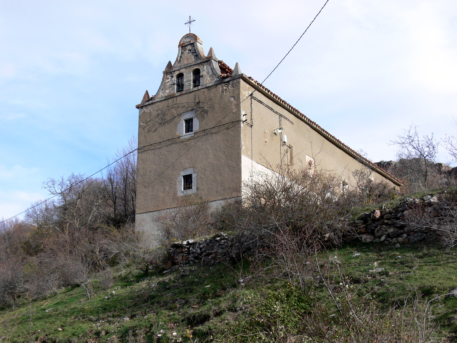 Ermita de la Virgen de la Cuesta en Gallinero de Cameros, La Rioja - España.